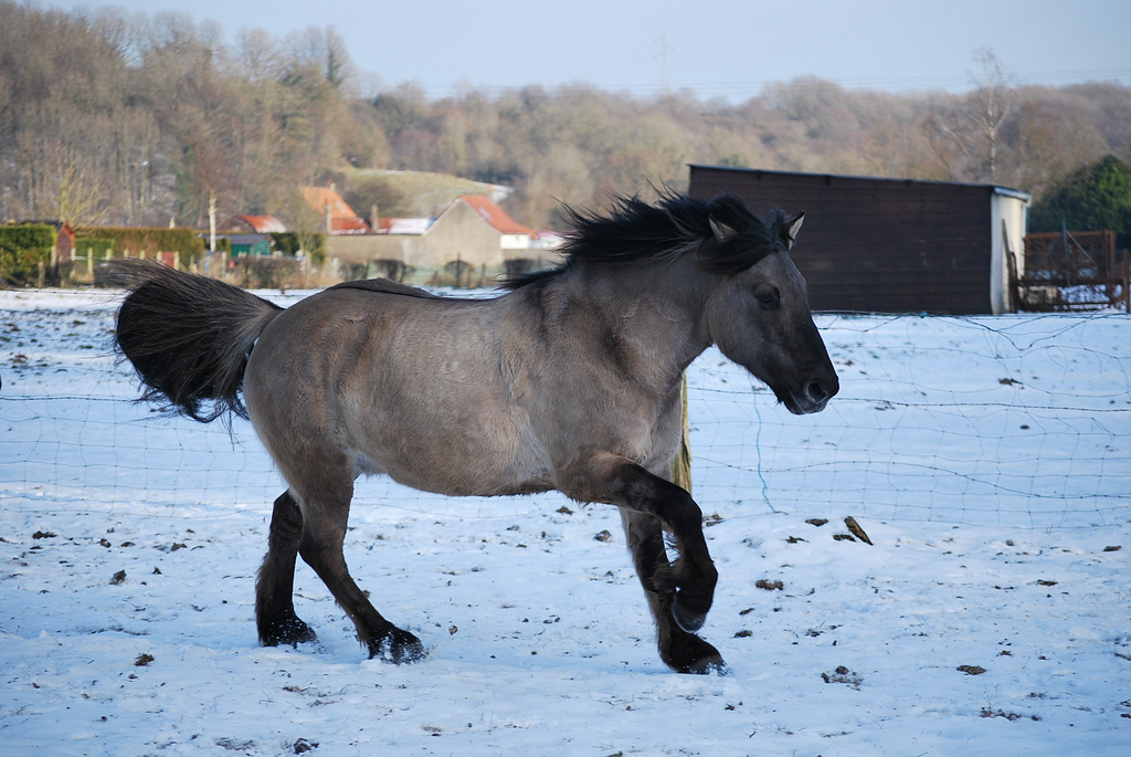 Un poney portant une robe sauvage, avec des zébrures sur les membres (dun)